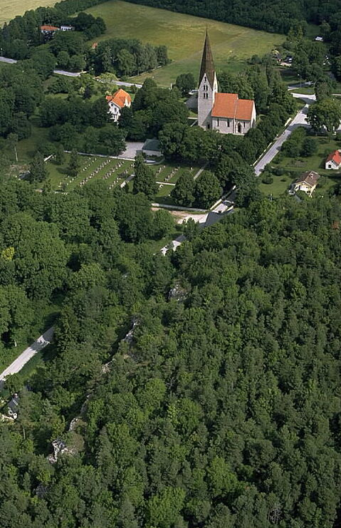 Motiv: Klinte kyrka Nyckelord: Flygbilder, Riksintressen Kategori: KyrkomiljöKlinte kyrka